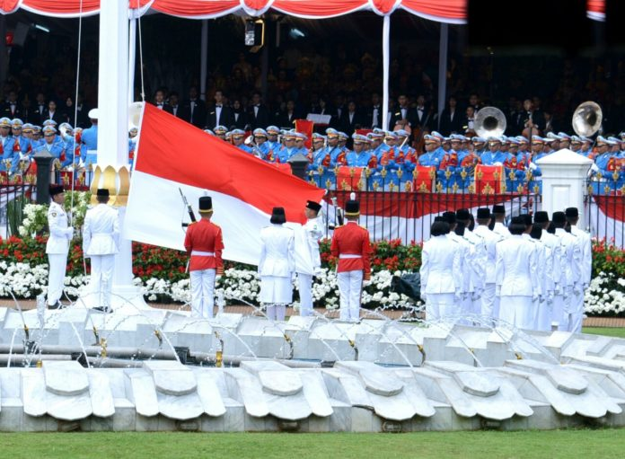 Pembentangan Sang Merah Putih saat upacara di Istana Negara pada 17 Agustus 2017.